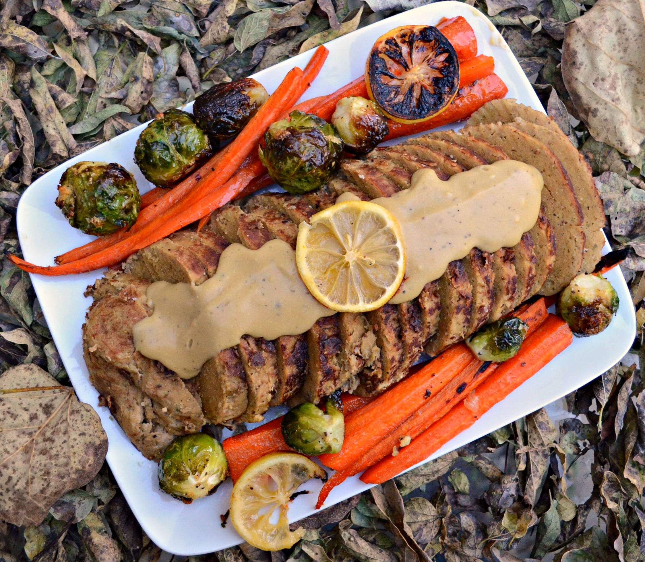 Vegan turkey